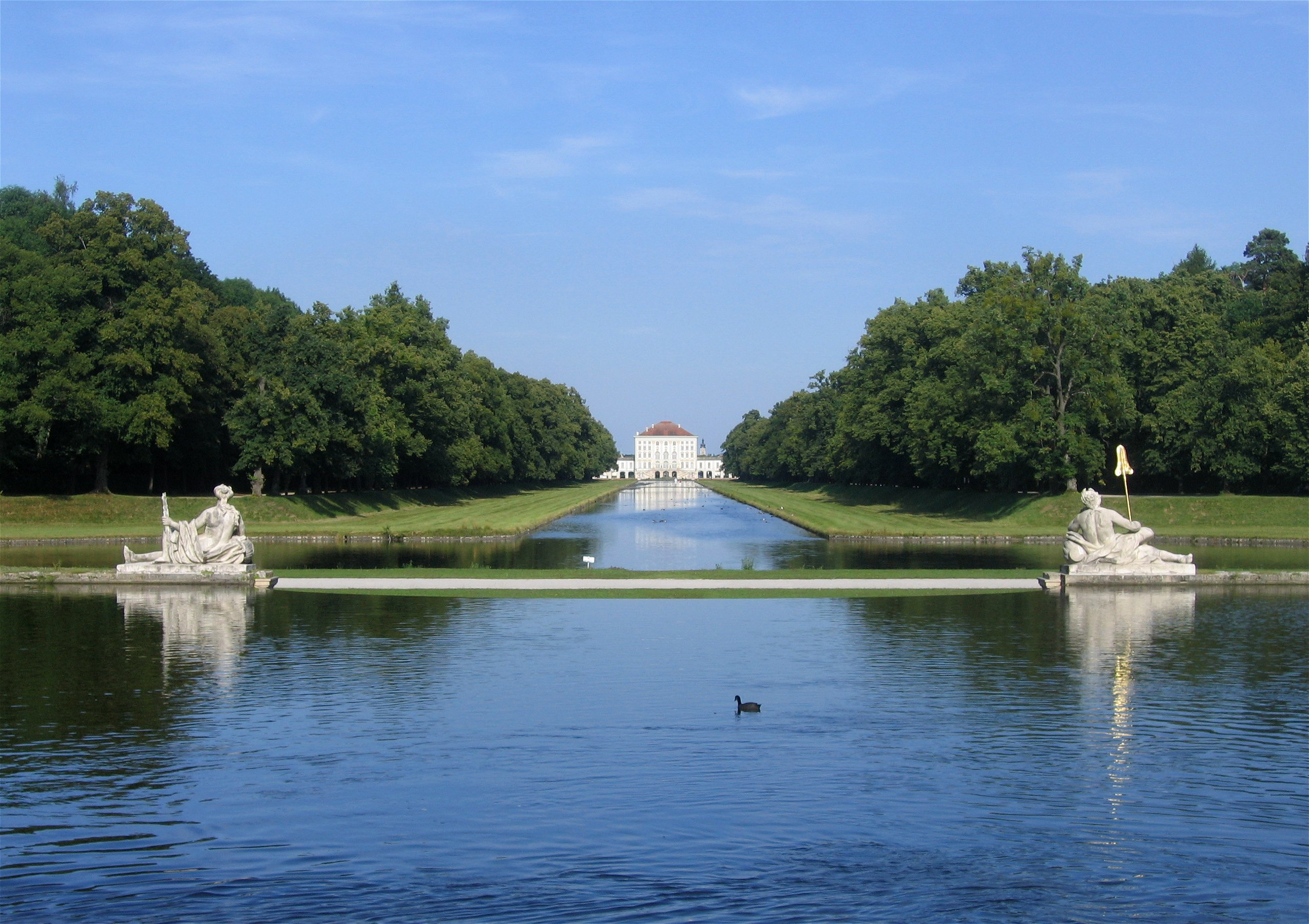 Schlosspark Nymphenburg: Blick von der Großen Kaskade zum Schloss Nymphenburg